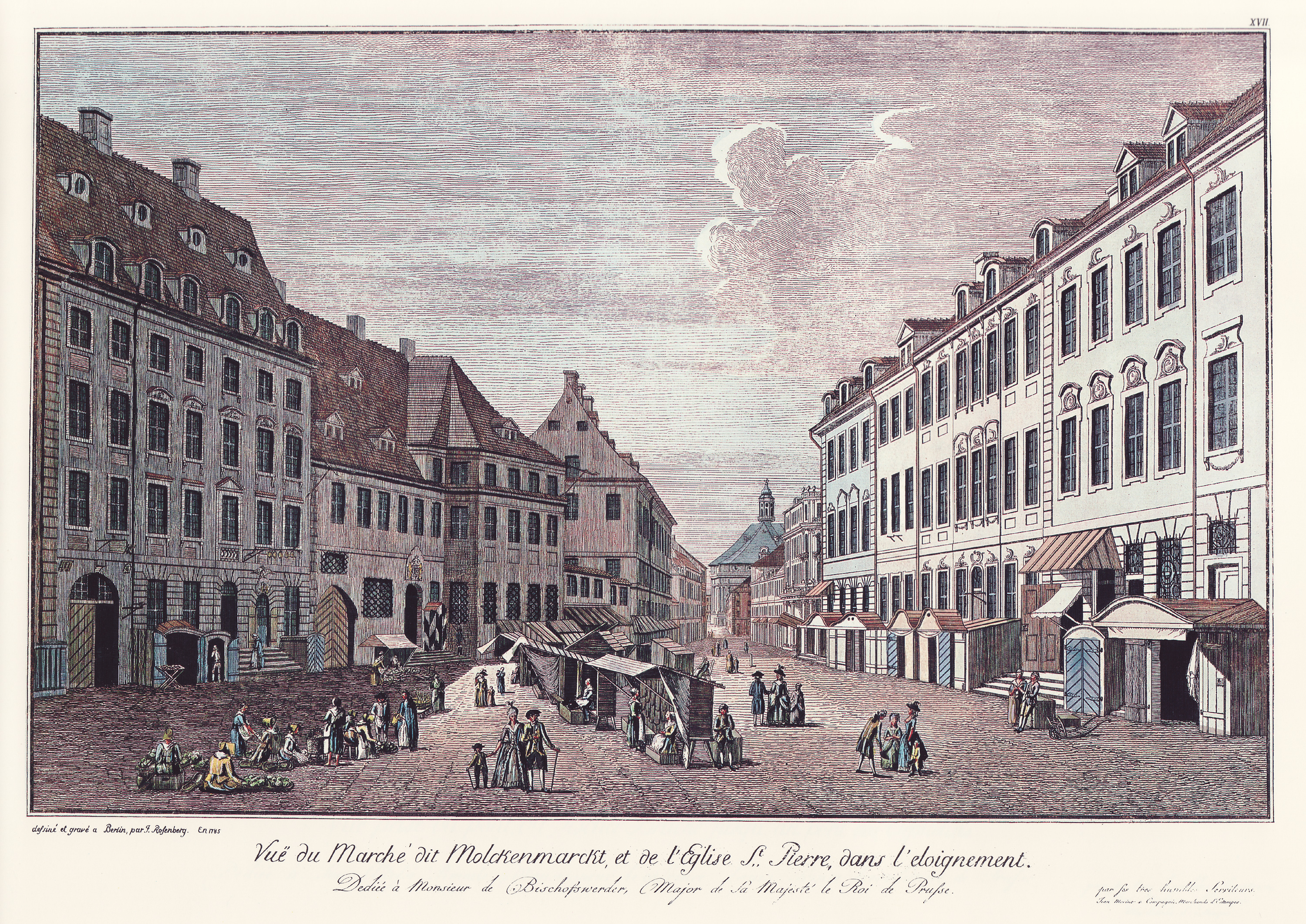 Ansicht des Molkenmarktes in Alt-Berlin/Deutschland